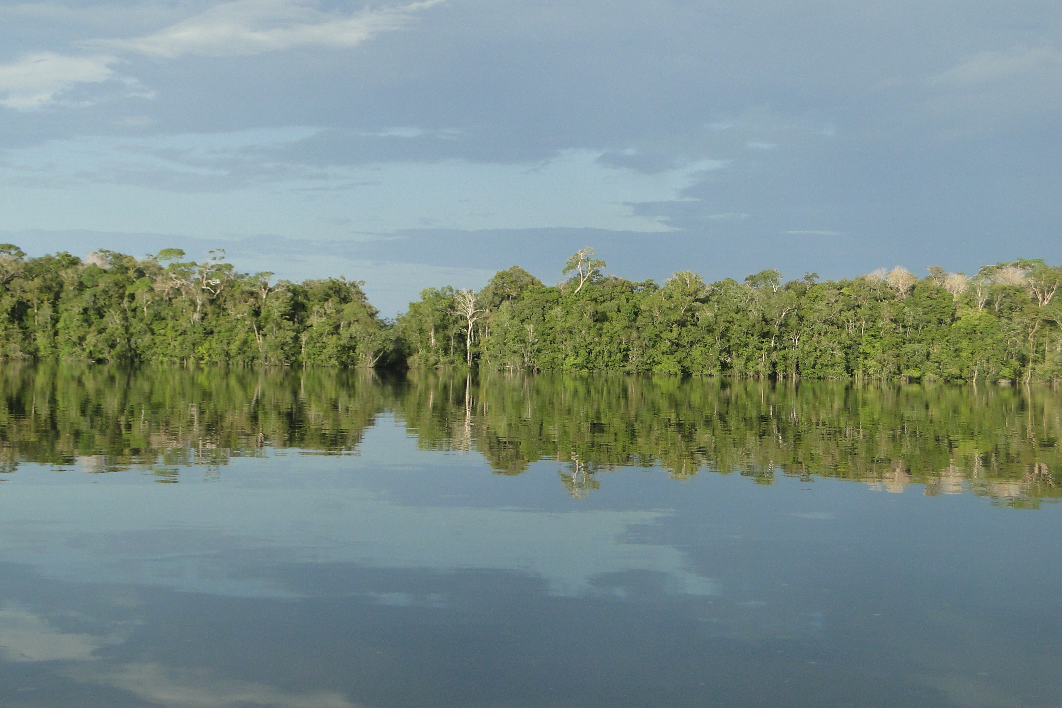 subindo o rio Içana, região dos povos Baniwa e Kurripako, na Terra Indígena Alto Rio Negro, Amazonas, Brasil.